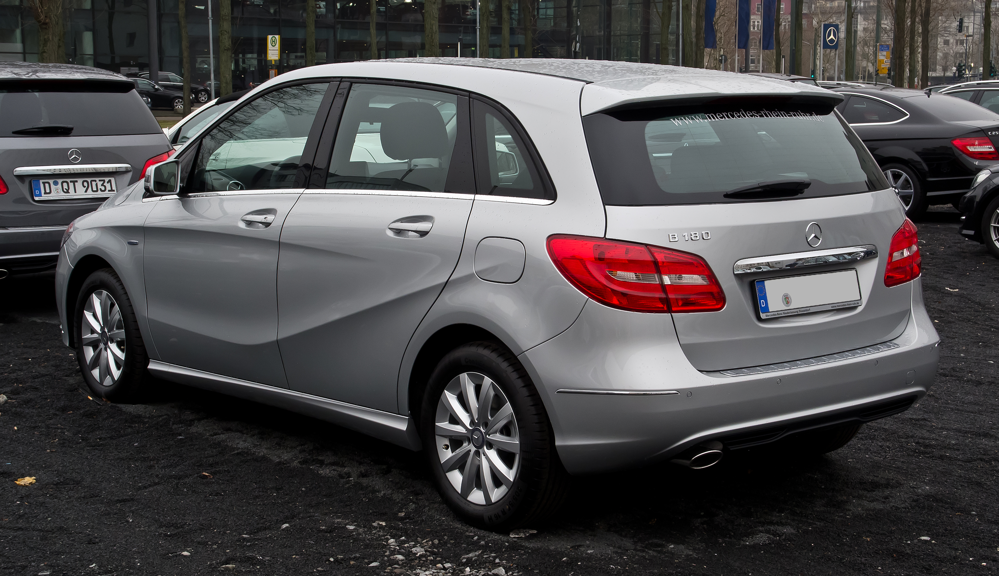 Mercedes-Benz B 180 BlueEFFICIENCY (W 246)